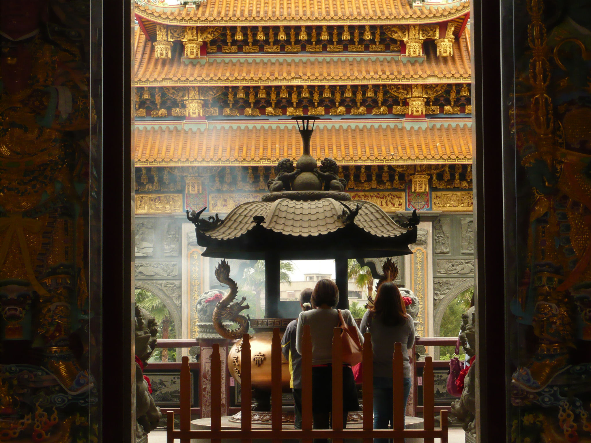 由寺內向天公爐拍攝。